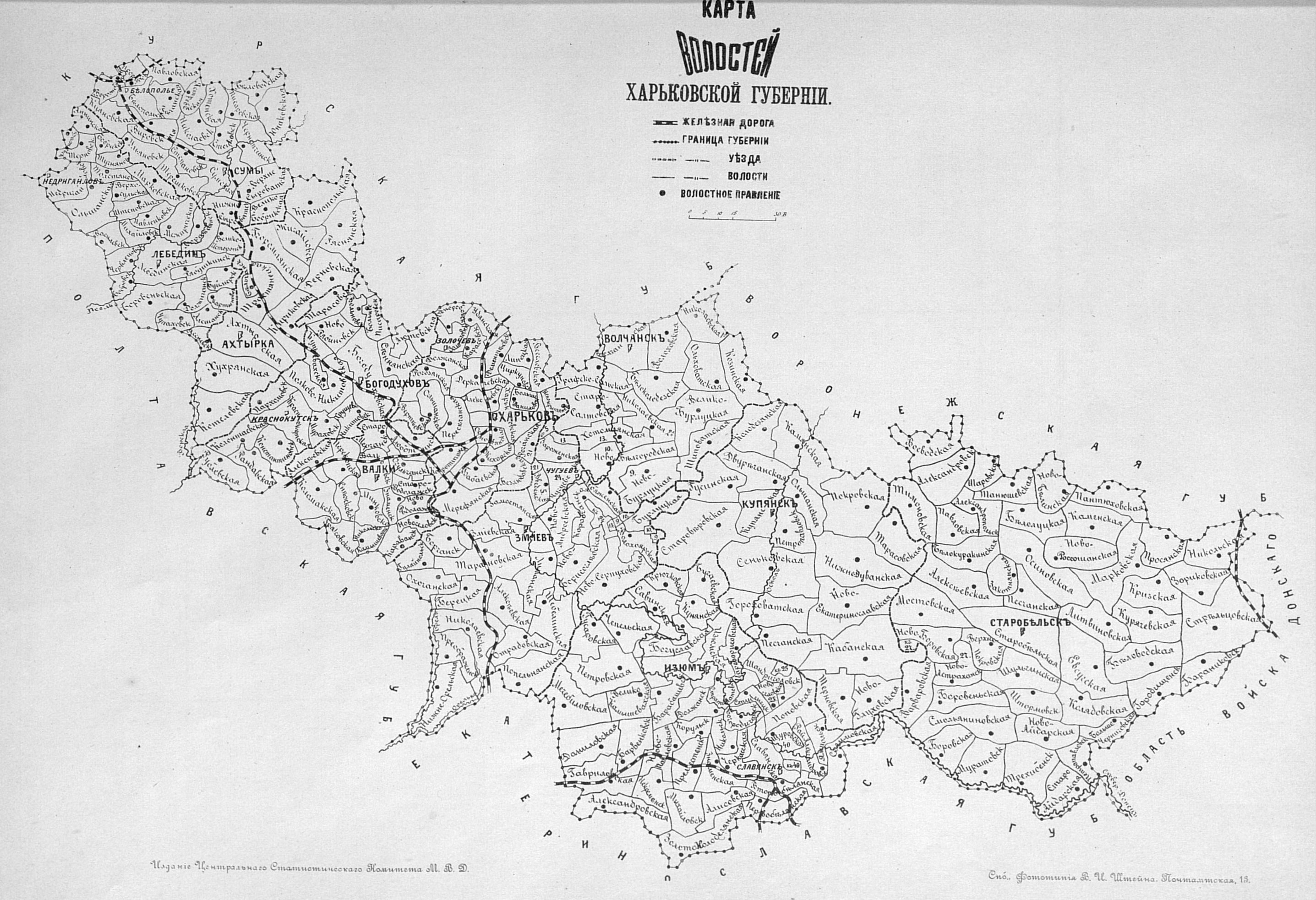 Карта волостей Харьковской губернии